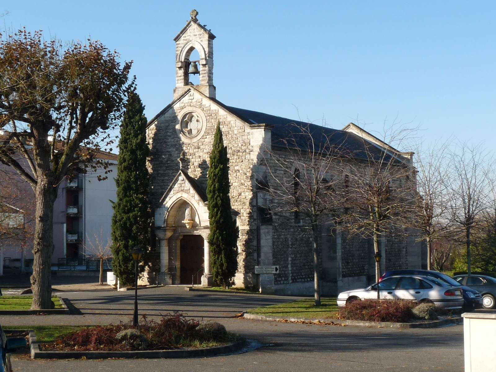 la chapelle de la Providence, Gond-Pontouvre, Charente, France